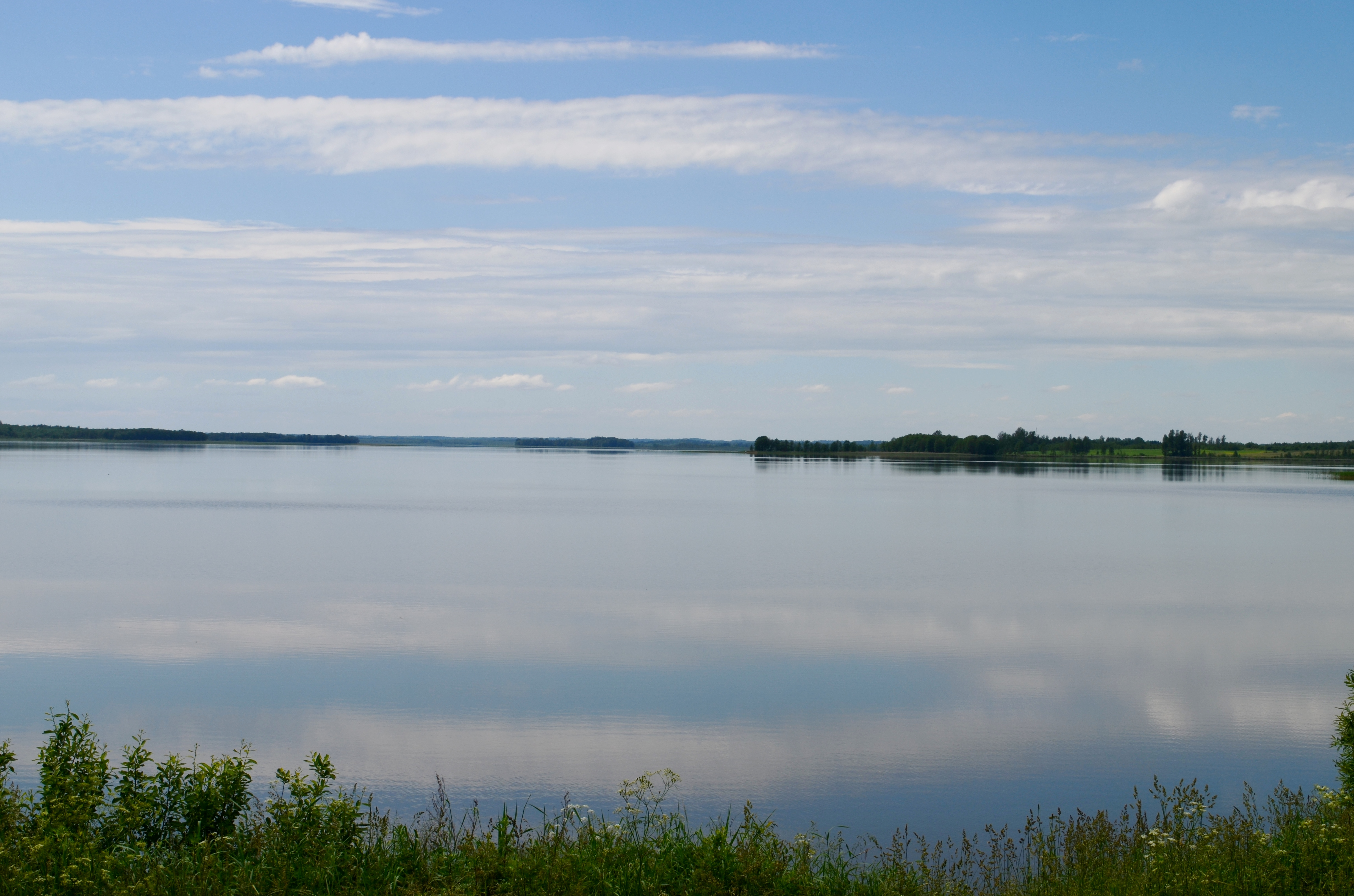 Dysnų ežeras nuo Čižiūnų pusės, Ignalinos r.